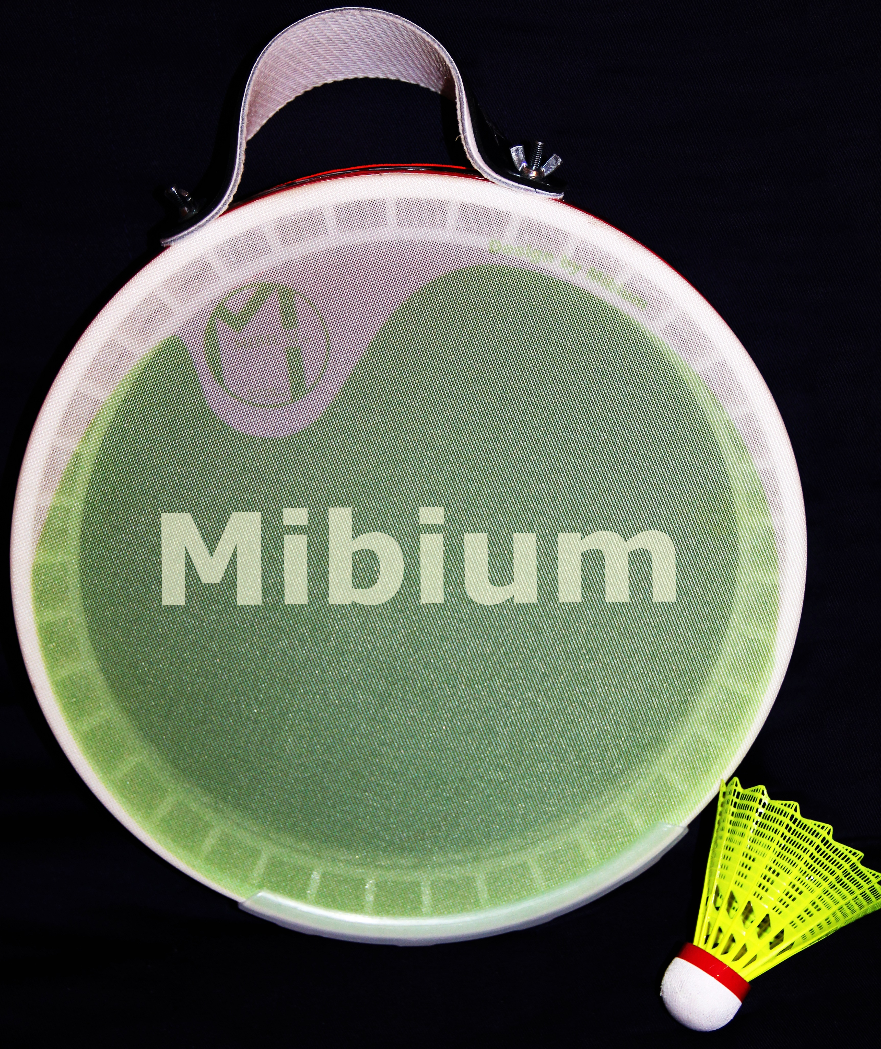 Tambourelli Schläger (26iger Ramen) mit Federball